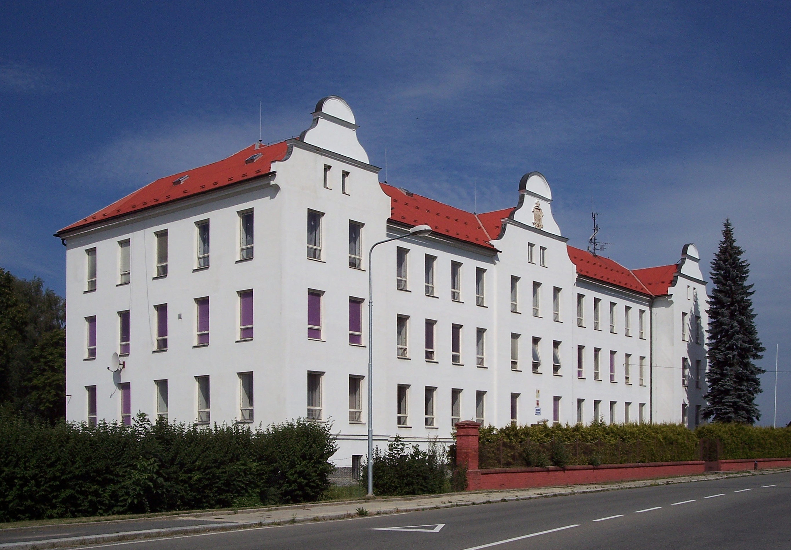 Budova Obchodní akademie v Mohelnici, okres Šumperk